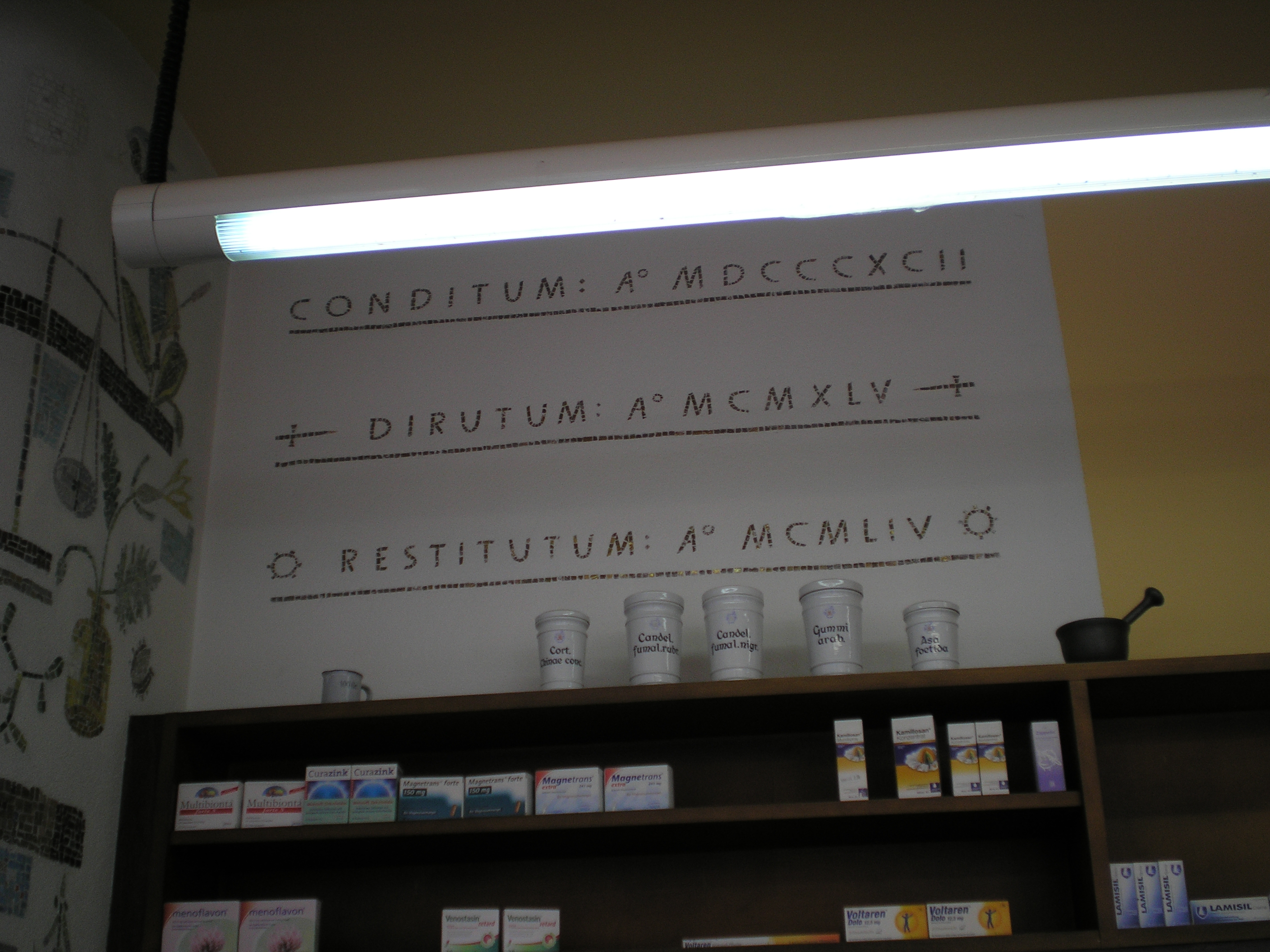 Latin sign in pharmacy in Berlin-Kreuzberg. Kottbusser Damm.